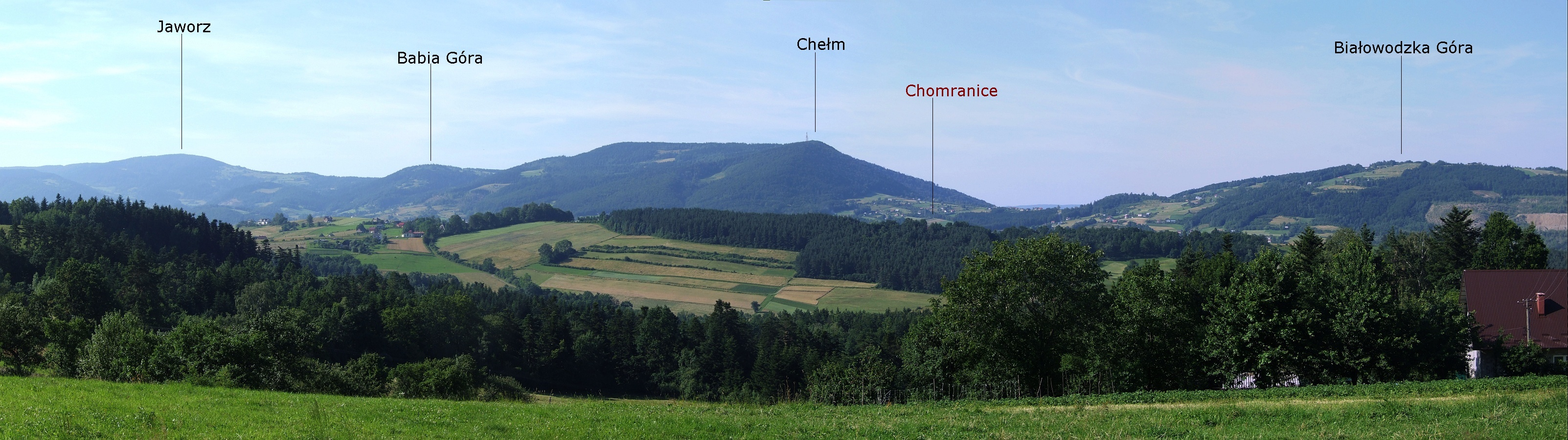 Widok z Wysokiego (spod Litacza) na wschodnią część Pasma Łososińskiego